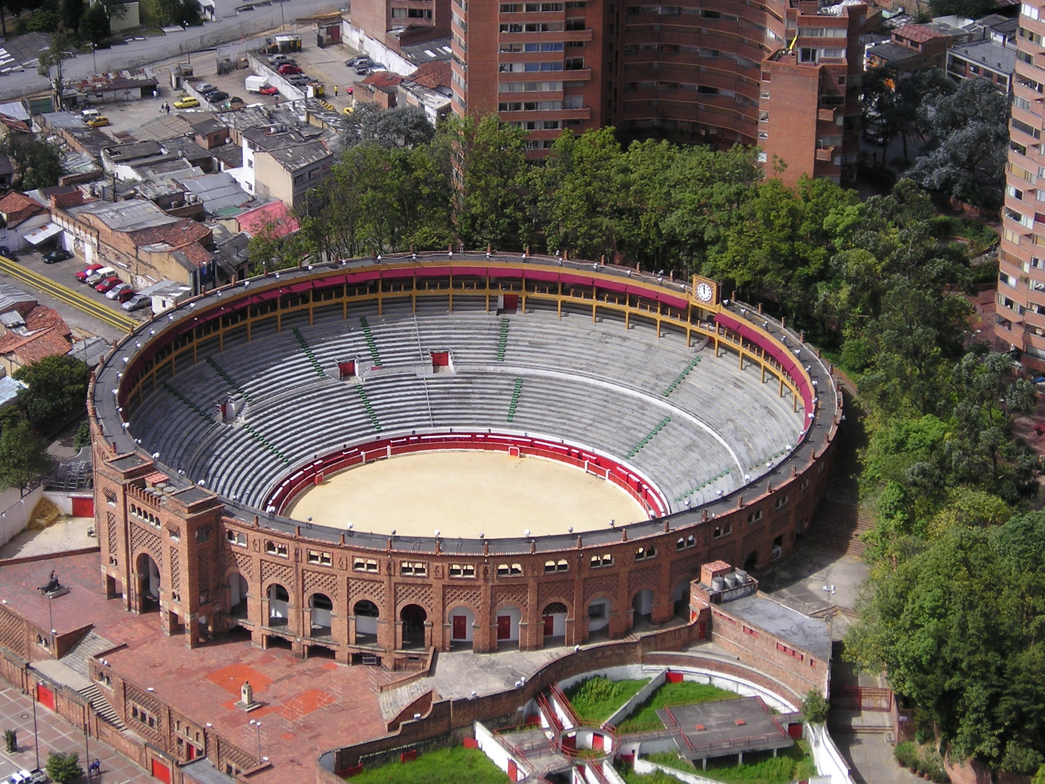 Fotografia de la plaza de toros La Santa Maria de la ciudad de Bogotá , tomada el 20 de julio de 2003 desde la torre colpatria